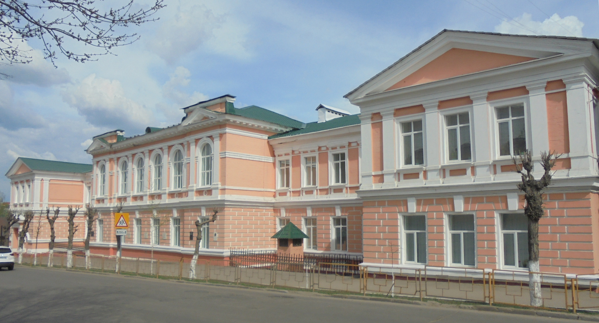 Здание, где в реальном училище учились писатели В.П. Ставский (Кирпичников), В.Н. Астров: улица Володарского, 1, Пенза, Пензенская область